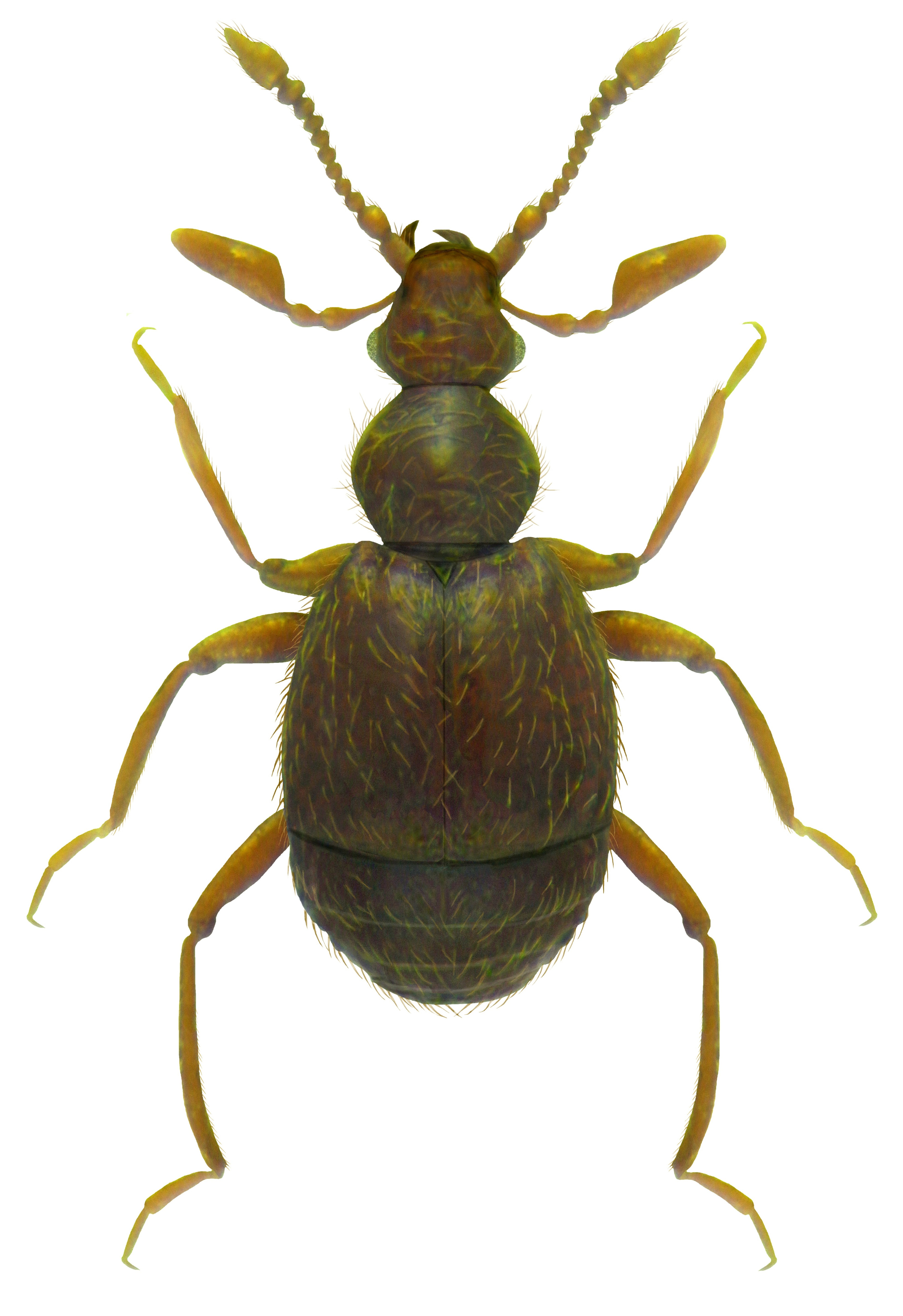 Familie: Pselaphidae Groesse: 1,45-1,65 mm Verbreitung: West-, Nord- und Mitteleuropa Ökologie: in faulendem Laub und in Moos Fundort: Germania, Rheinland-Pfalz, Altenahr leg.det. J.Scheuern, 1988 Photo: U.Schmidt, 2011